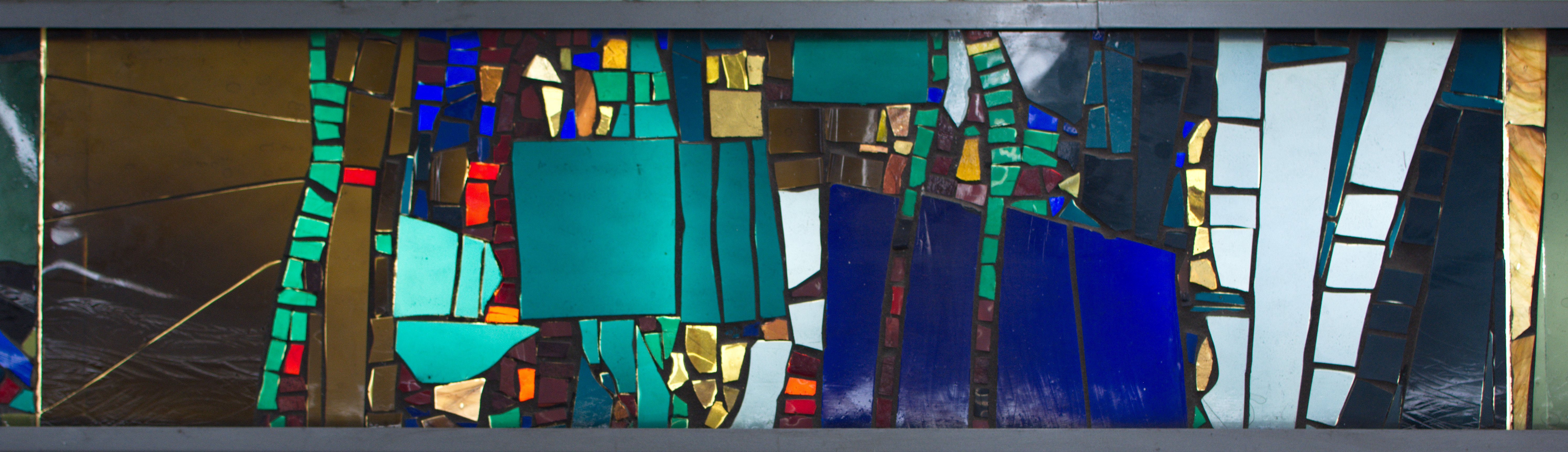 Georg Schmidt-Westerstede: Lichtband-Mosaik aus durchsichtigem farbigen Glas (Detailabbildung). Oldenburg (Oldenburg), Herbartgang. Wv-Nr. 2088, 1963.